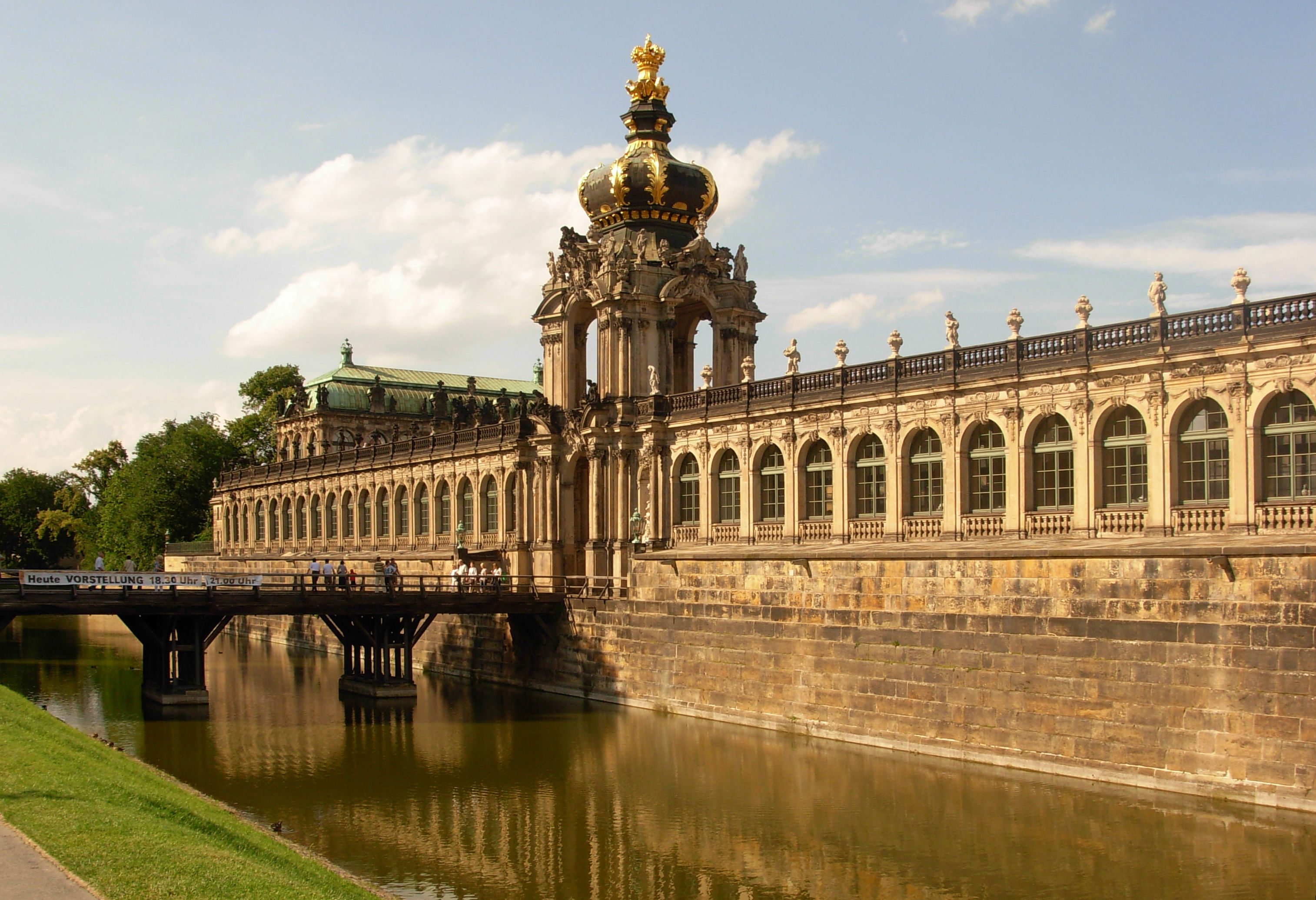 Zwinger, Dresden/Cvingerio rūmai - Karūnos vartai